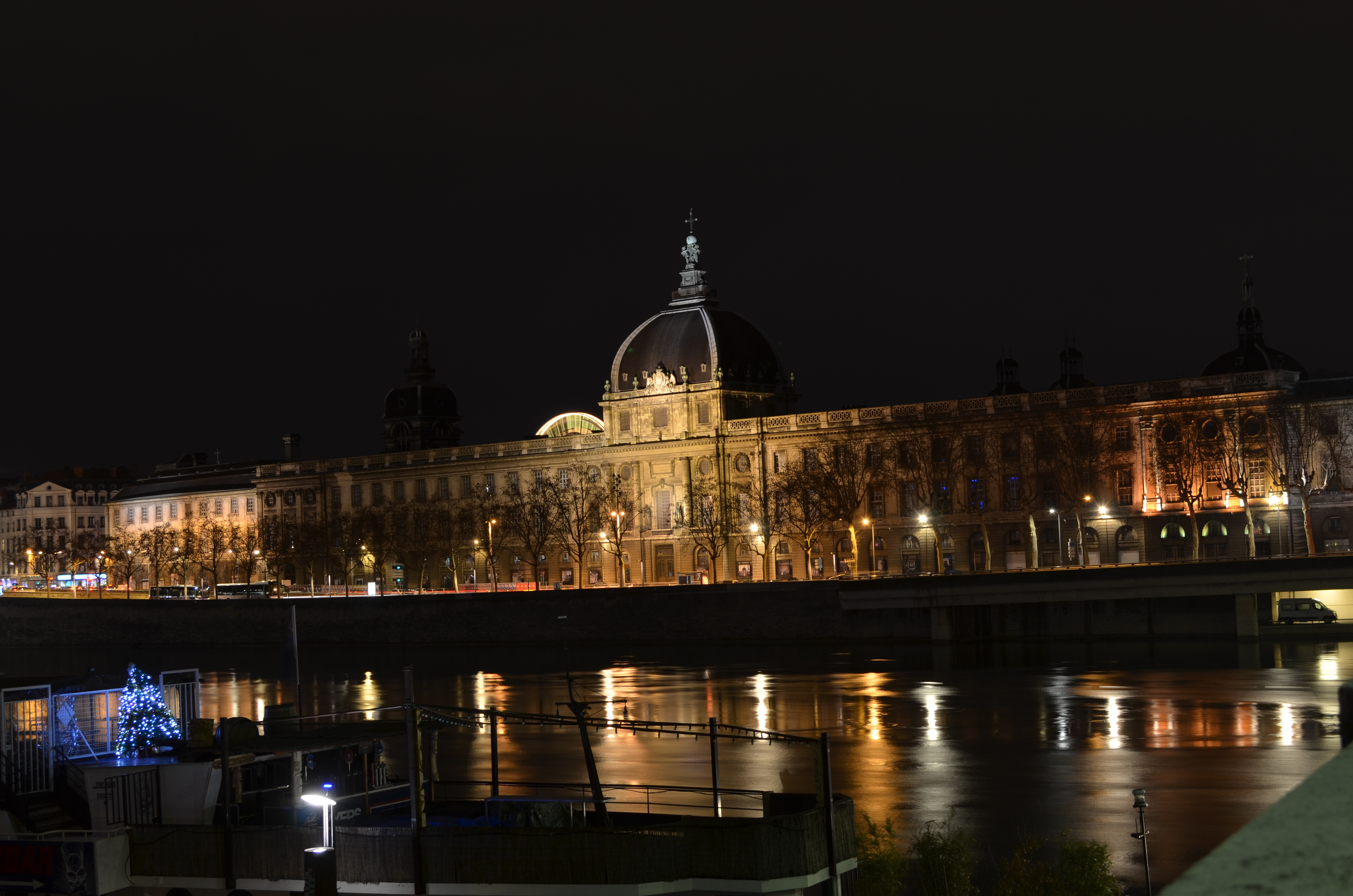 L'Hôtel-Dieu de Lyon de nuit